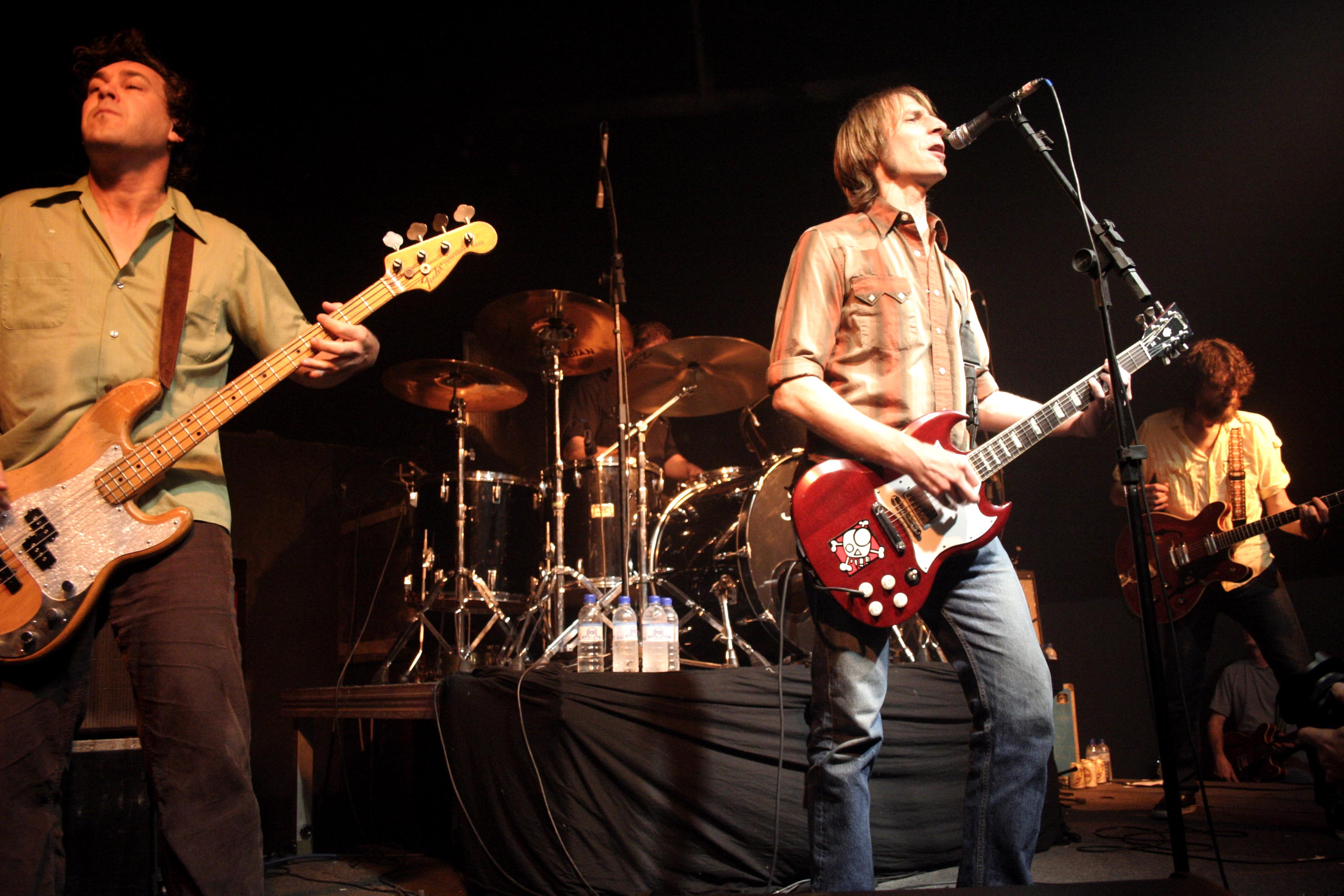 Mudhoney in 2007